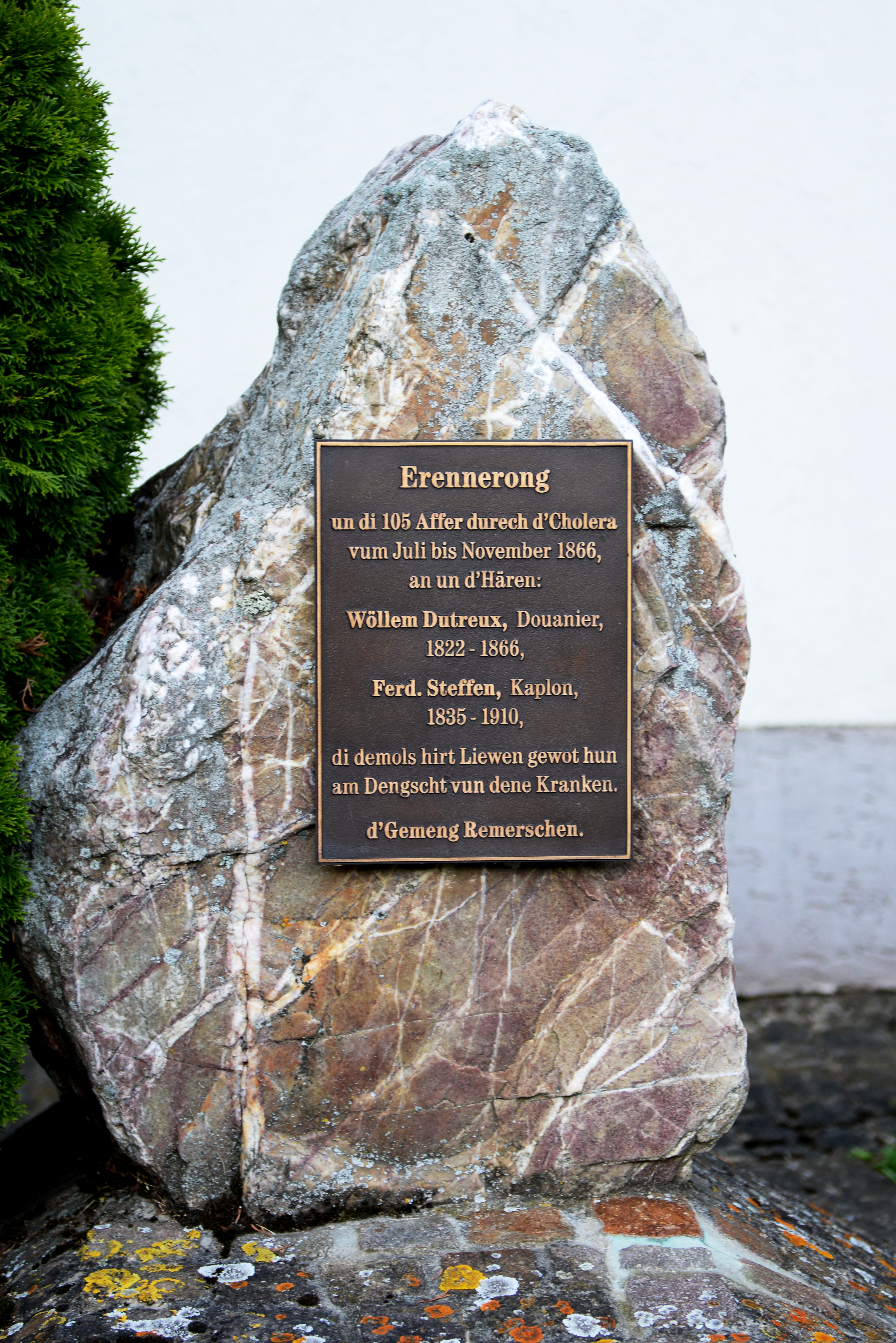 Erënnerungsplack un d'Cholerasepidemie vun 1866, nieft der Kierch zu Rëmerschen.